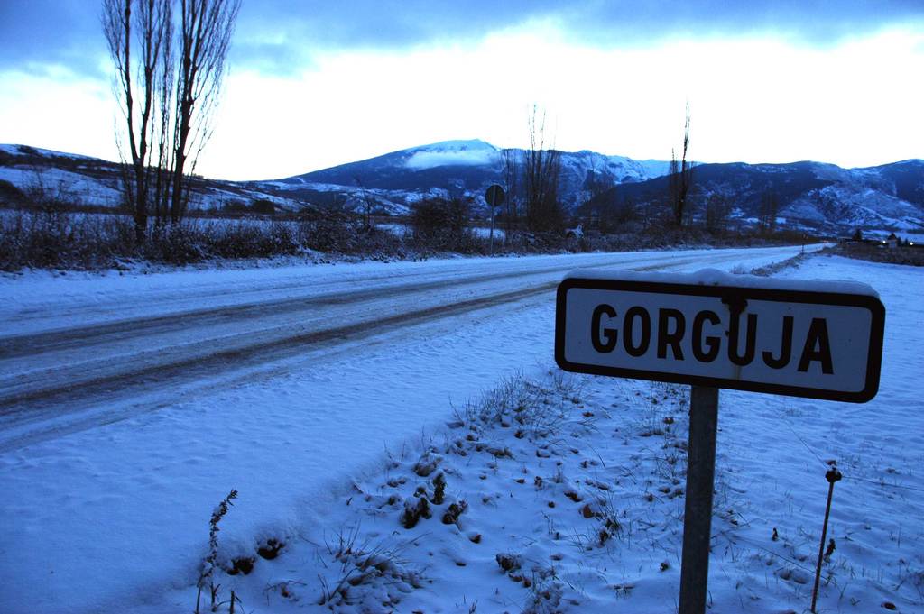 Gorguja, al municipi de Llívia (Espanya)